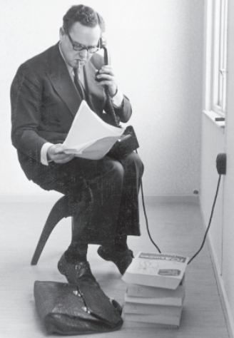 Henrik Dyfverman 1956